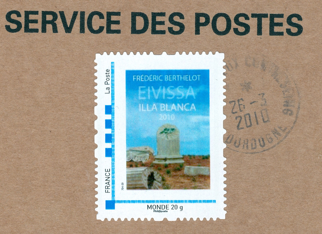 Imagen de un sello de correos que realicé a traves del servicio de personalizacion de sellos de correos de Francia El diseño es el montaje que realice a partir de una fotografía mía de una escultura situada en Ibiza del escultor francés Frédéric Berthelot.